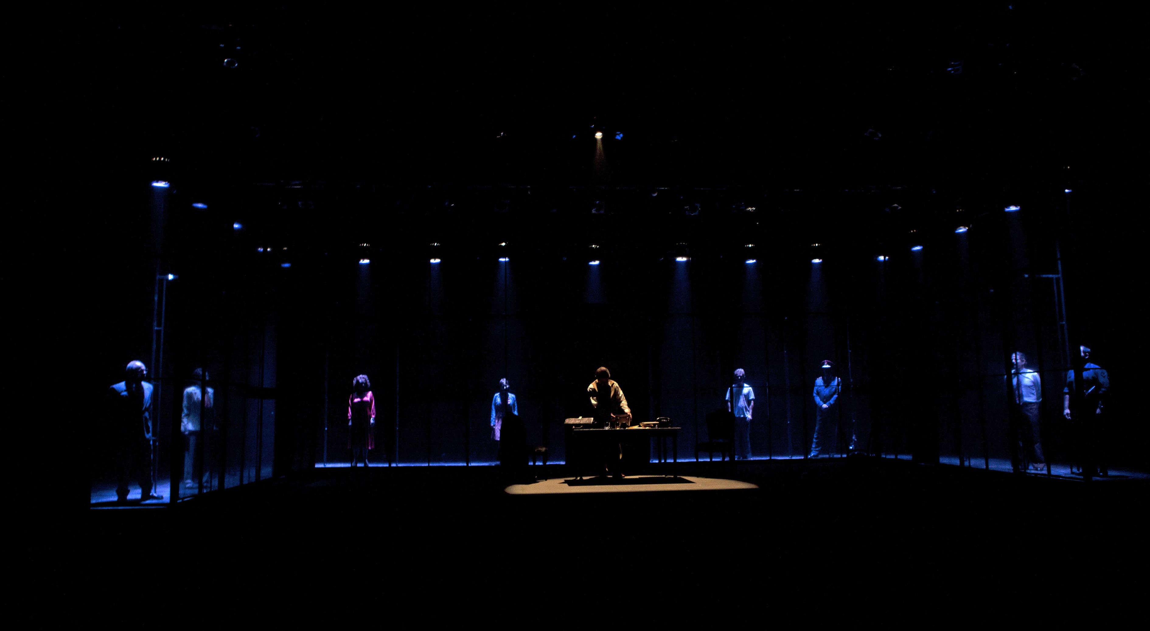 ארגנטינה תיאטרון חיפה בימוי סיני פתר צילום ז'ראר אלון